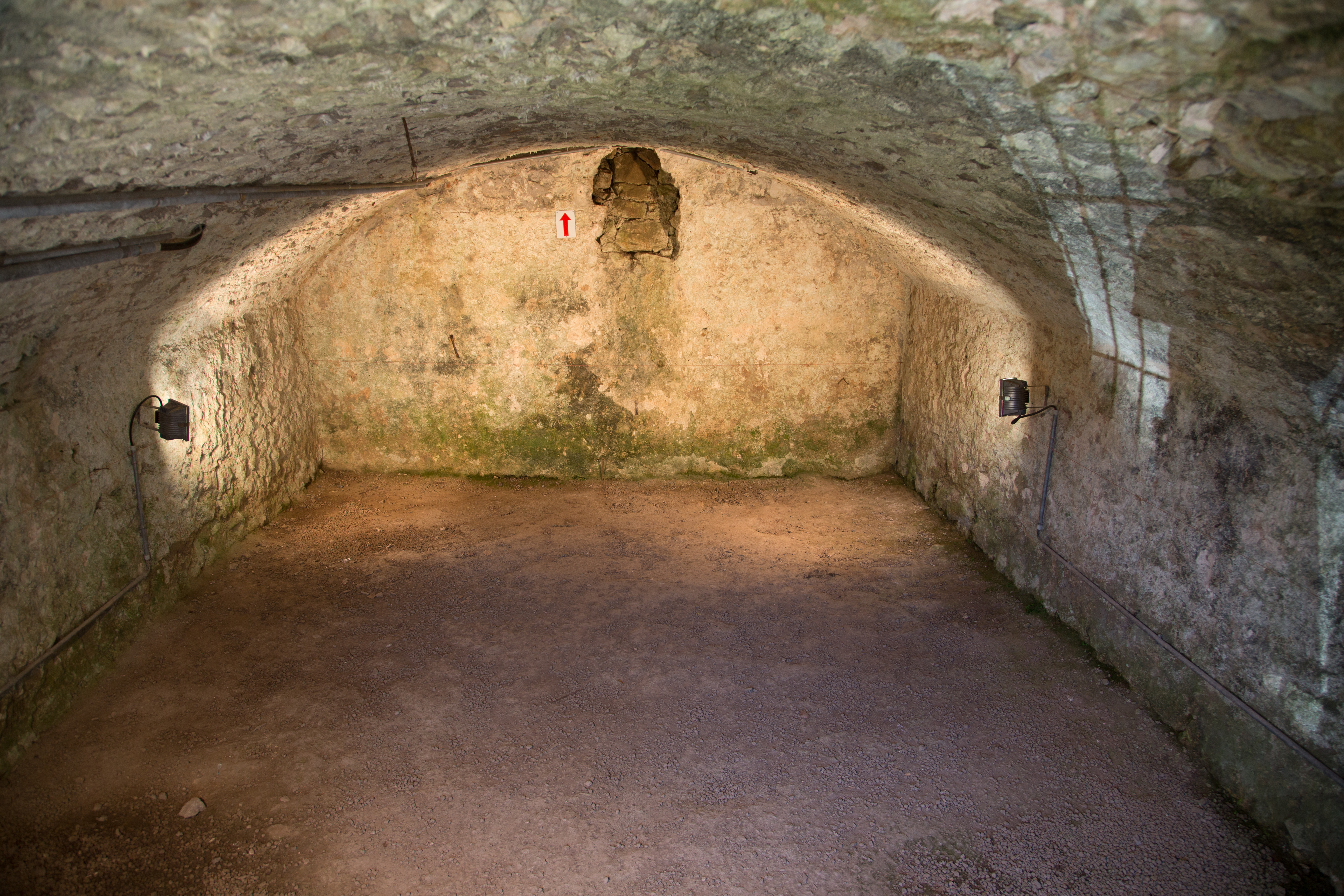 Tiergarten-Tunnel in Blankenheim, Blick ins Wasserreservoir bei Burg Blankenheim